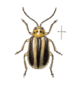 Amphelasma decoratum (Diabrotica decorata).